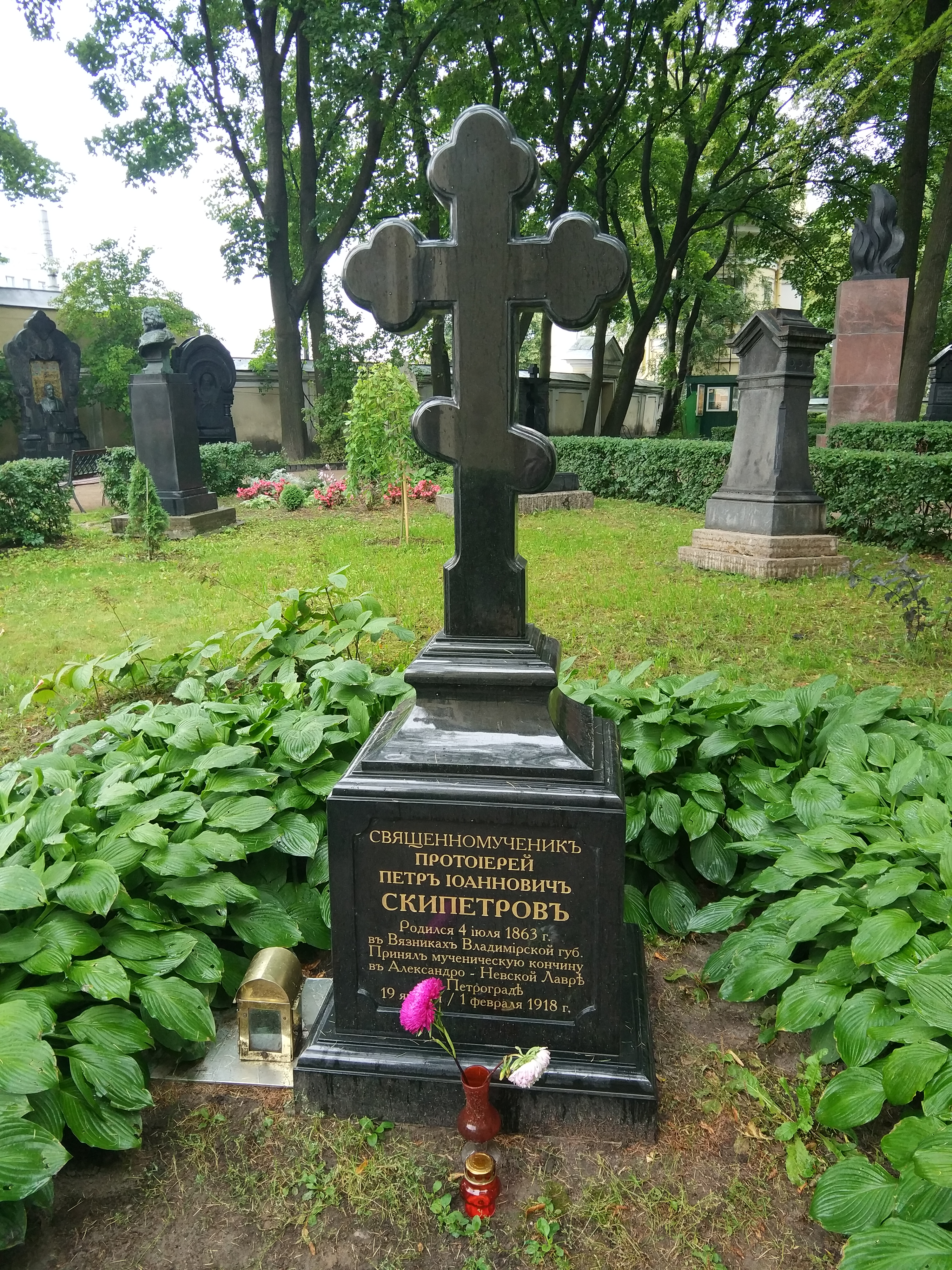 Надгробный памятник cвященномученика Петра Скипетрова на Тихвинском кладбище. На заднем плане слева виднеется могила композитора А. П. Бородина.